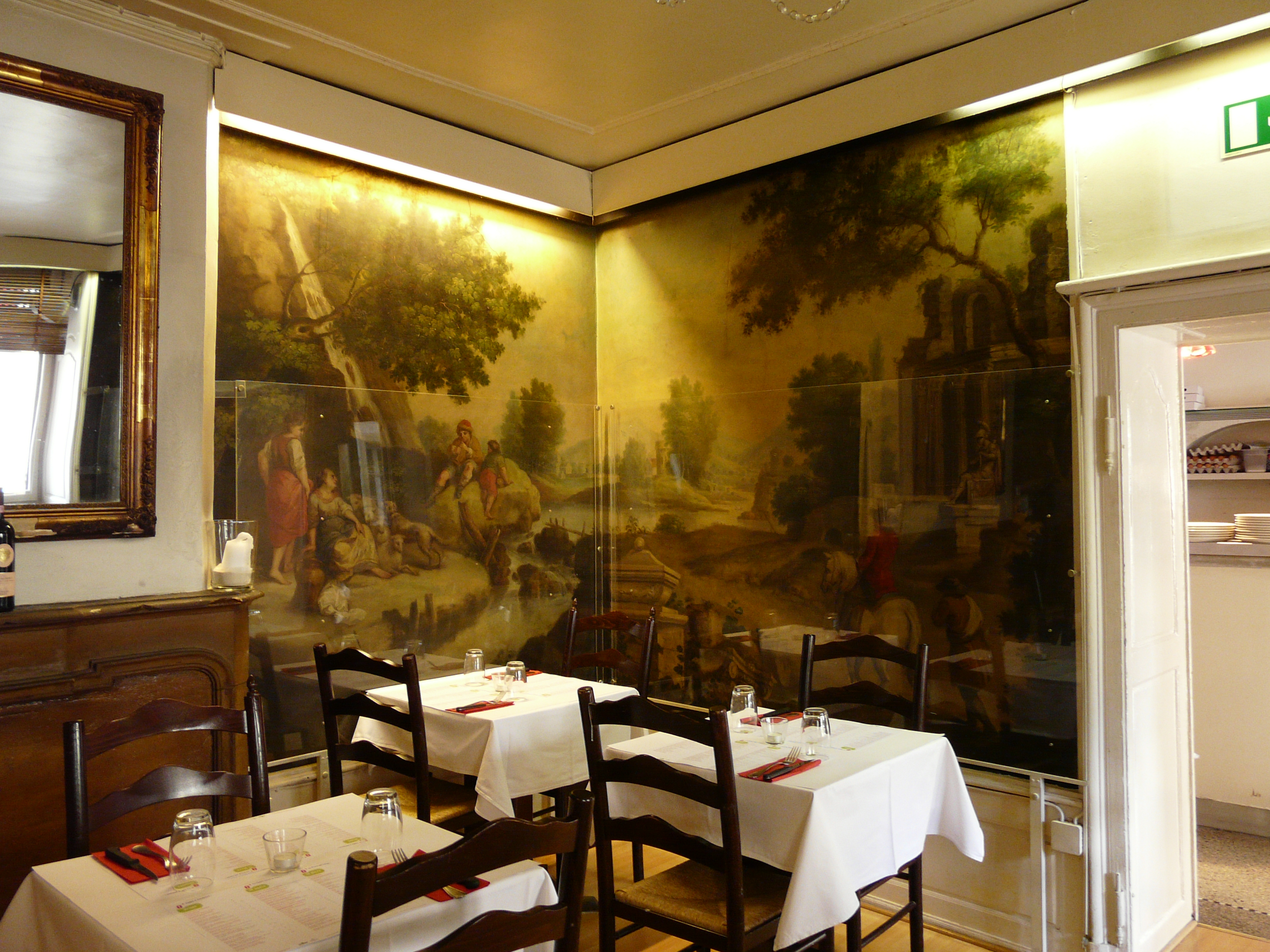 Le rez-de-chaussée avec les peintures murales du frère Abraham Gilson d’Orval de l’immeuble sis 11, rue du Nord